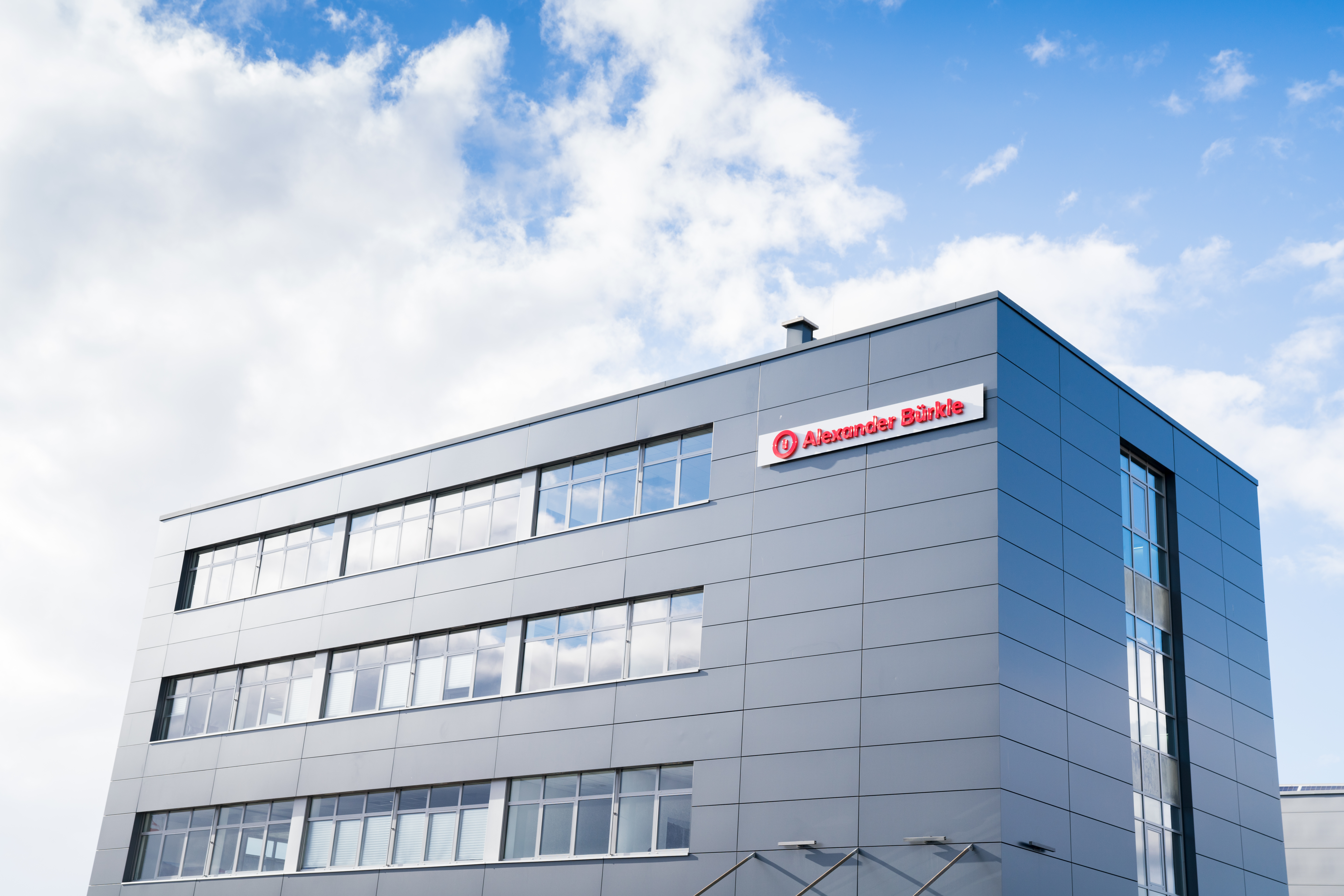 Firmengebäude